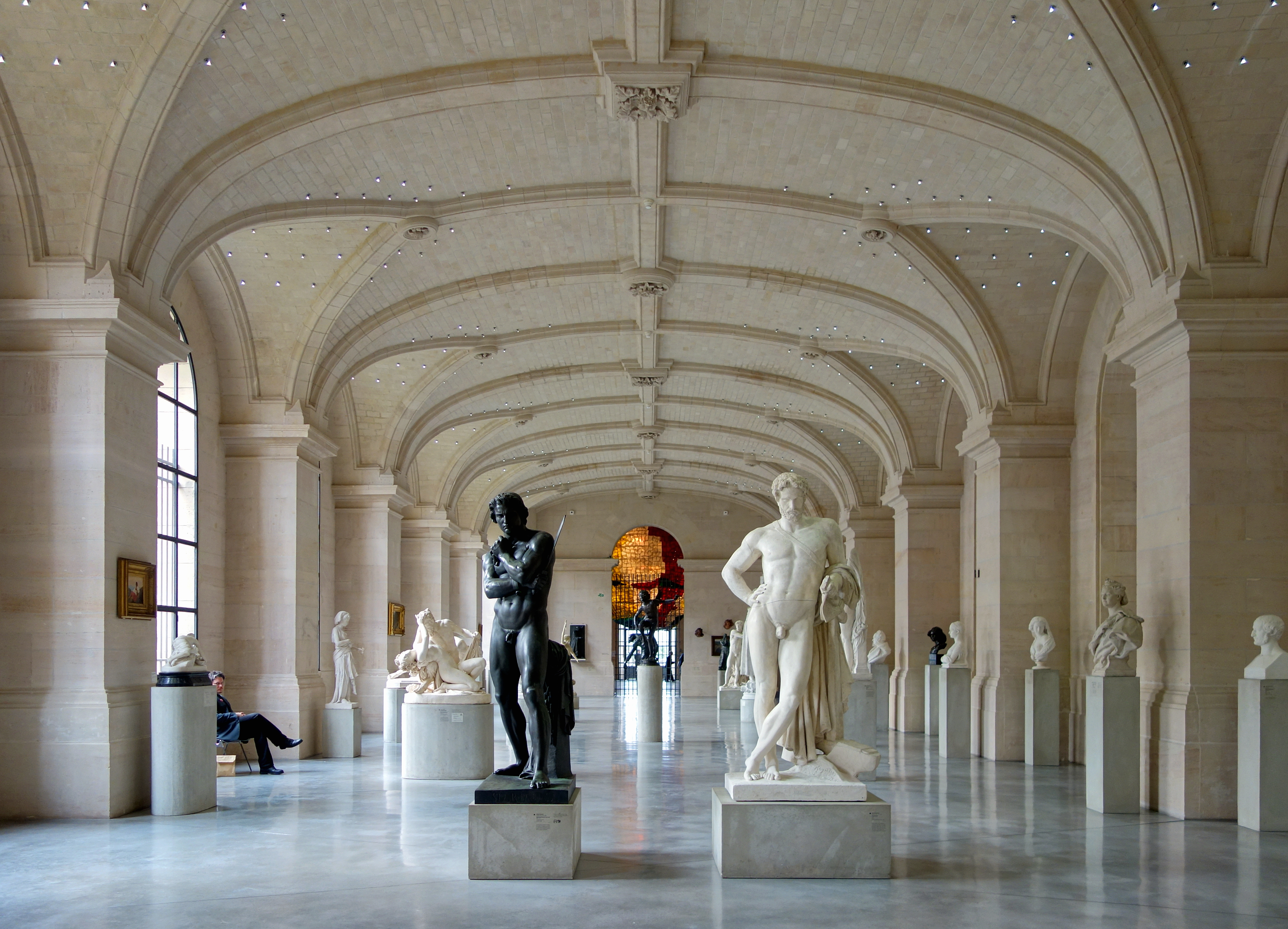 Galerie de la sculpture au Palais des beaux-arts de Lille.